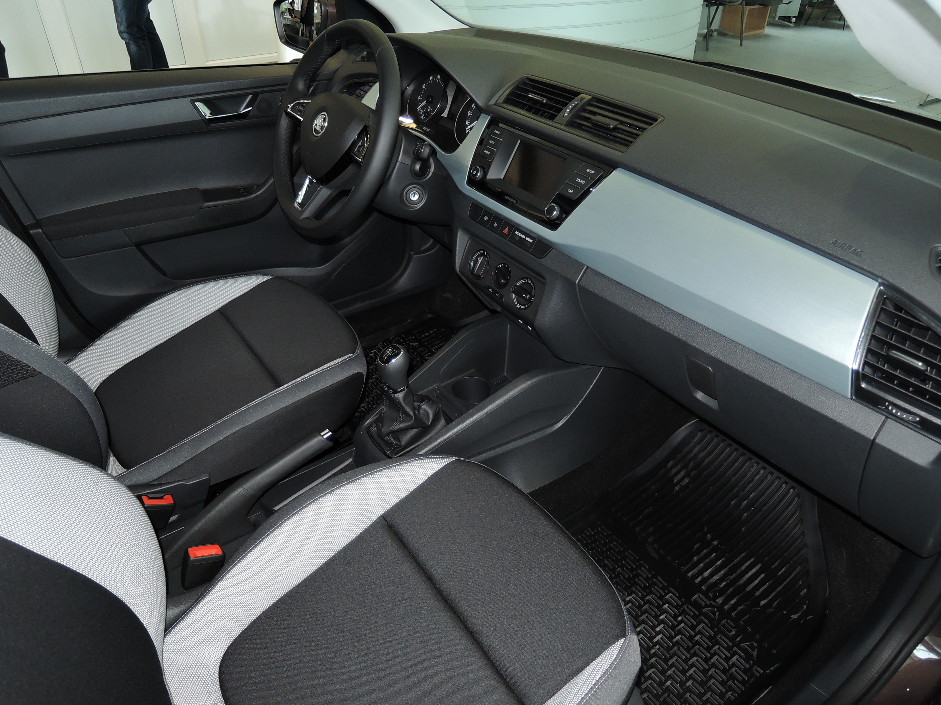 Škoda Fabia III, interiér čierny BL